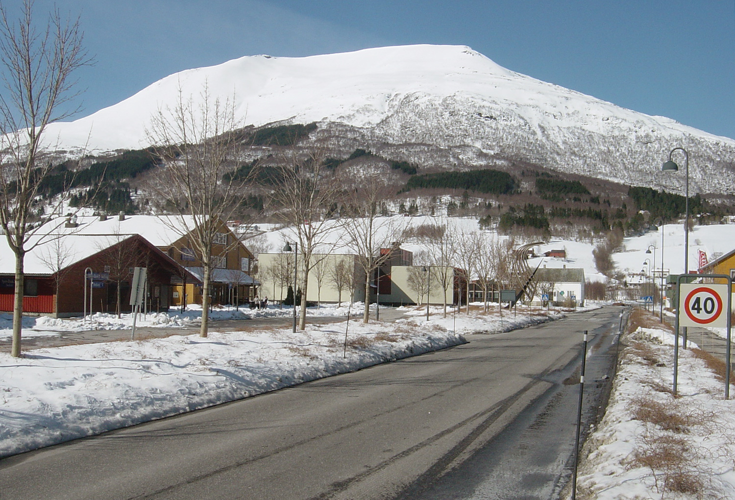 Gjemnes and the Batnfjordsøra